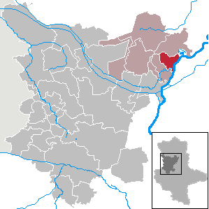 Rogätz in Saxony-Anhalt (Country) - District (Landkreis) Börde